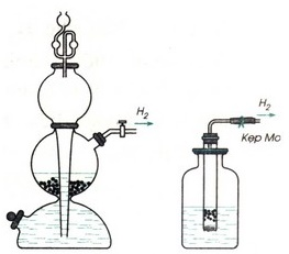 ảnh hoạt hình